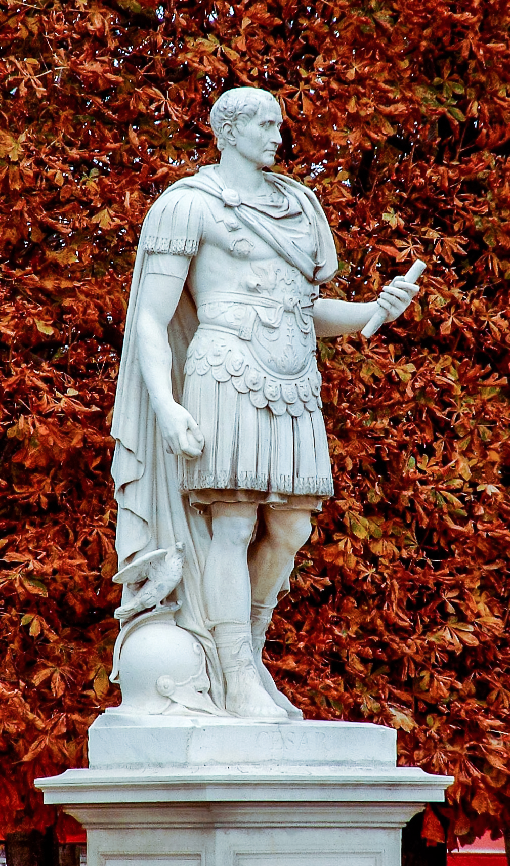 Jules César d'après l'antique, statue en marbre (1688-1694) par Ambrogio Parisi (1676 ? - 1719) - Installée au jardin des Tuileries (Paris, 1er arrond.) en 1800.